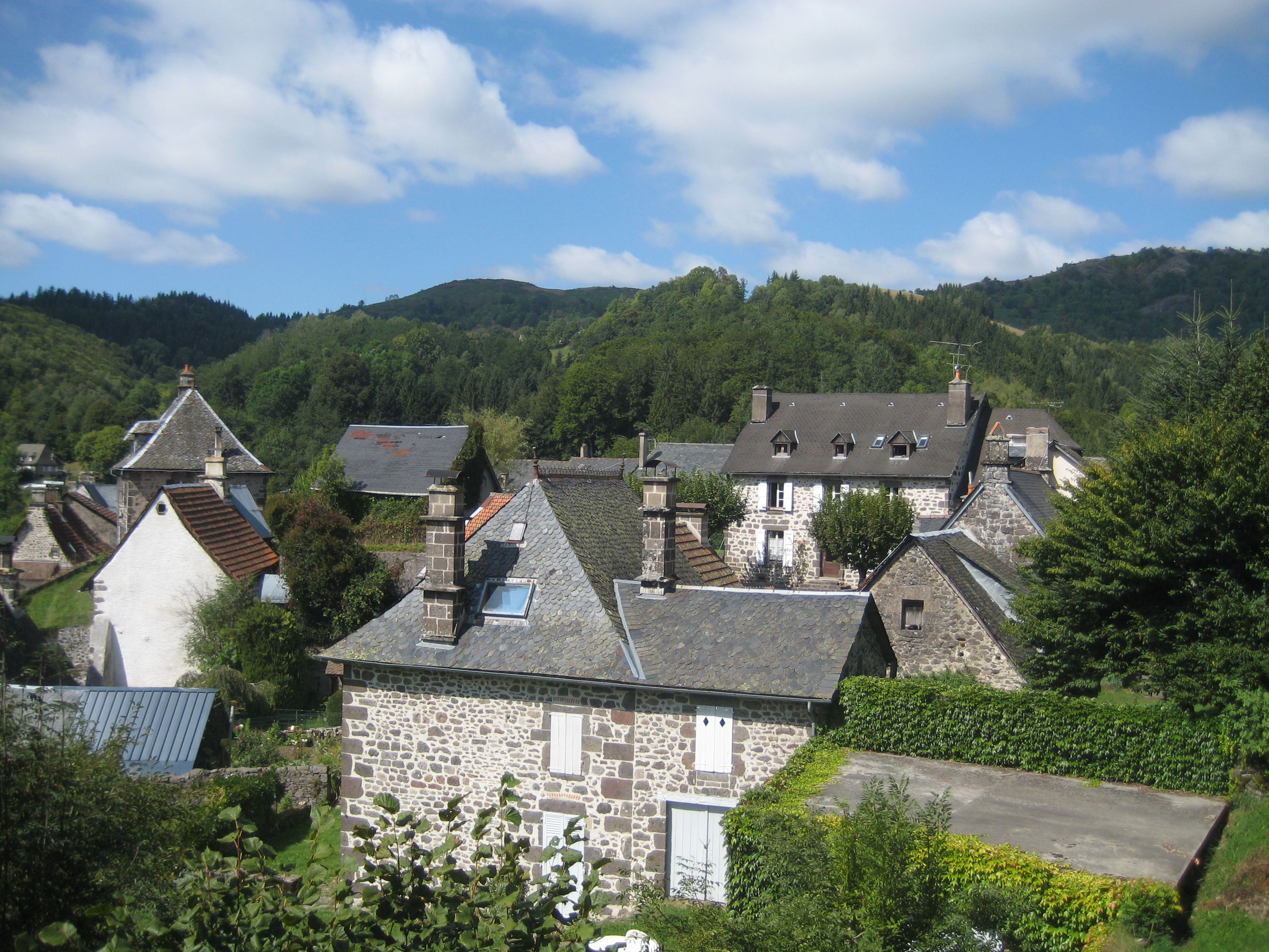 vue de Saint-Cirgues-de-Jordanne